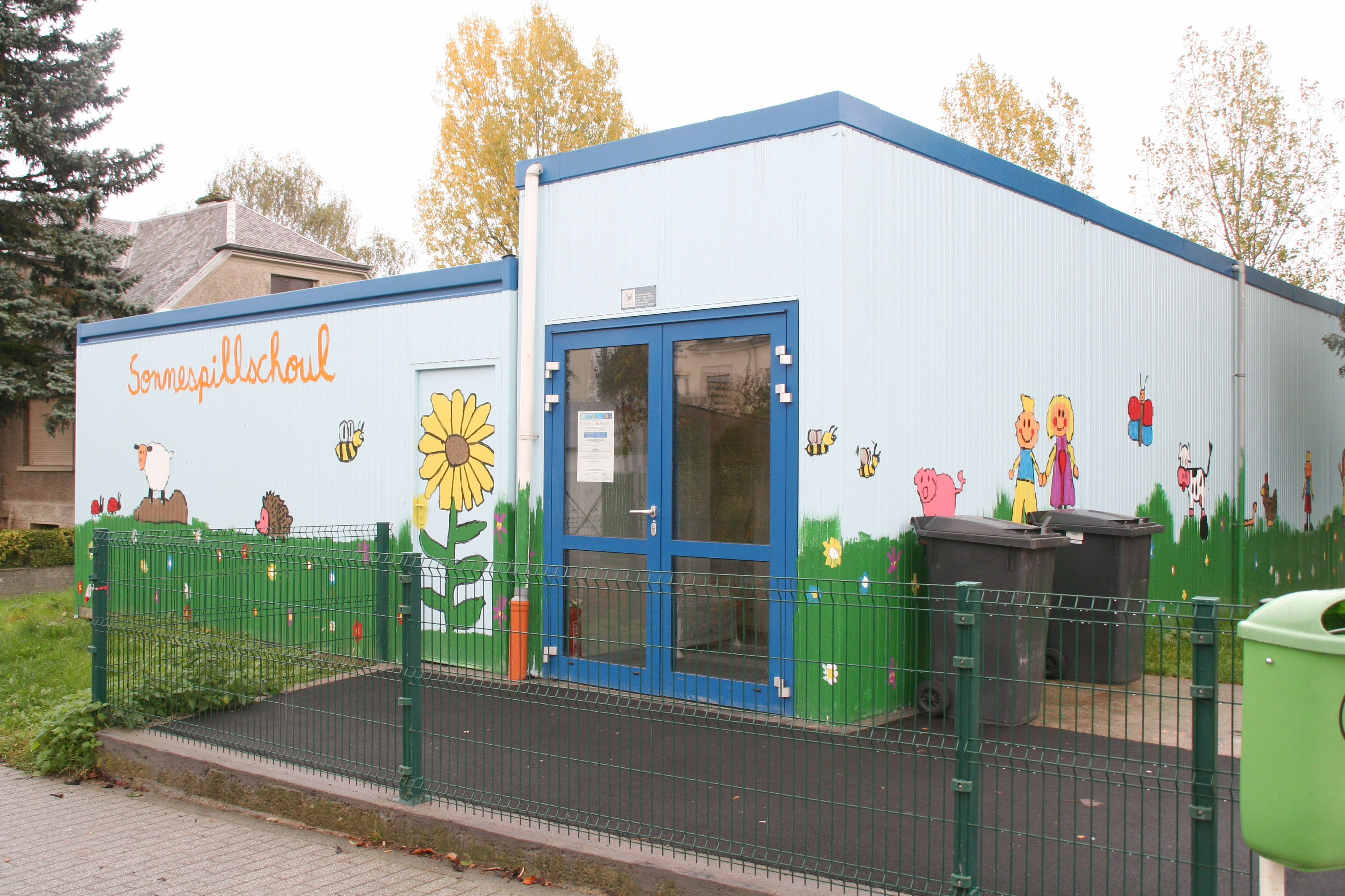 NAE SPI.